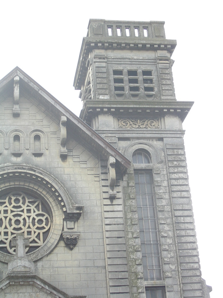 Eglise Saint Henri Hénin Beaumont